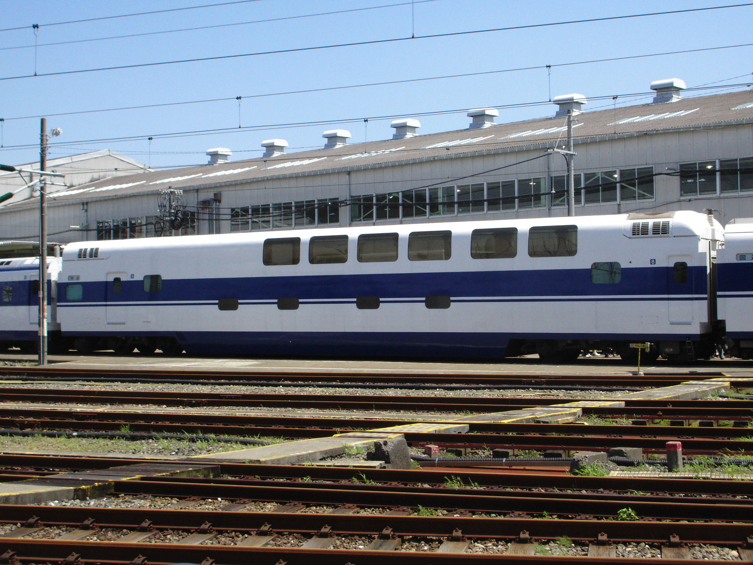 100系新幹線168-9001